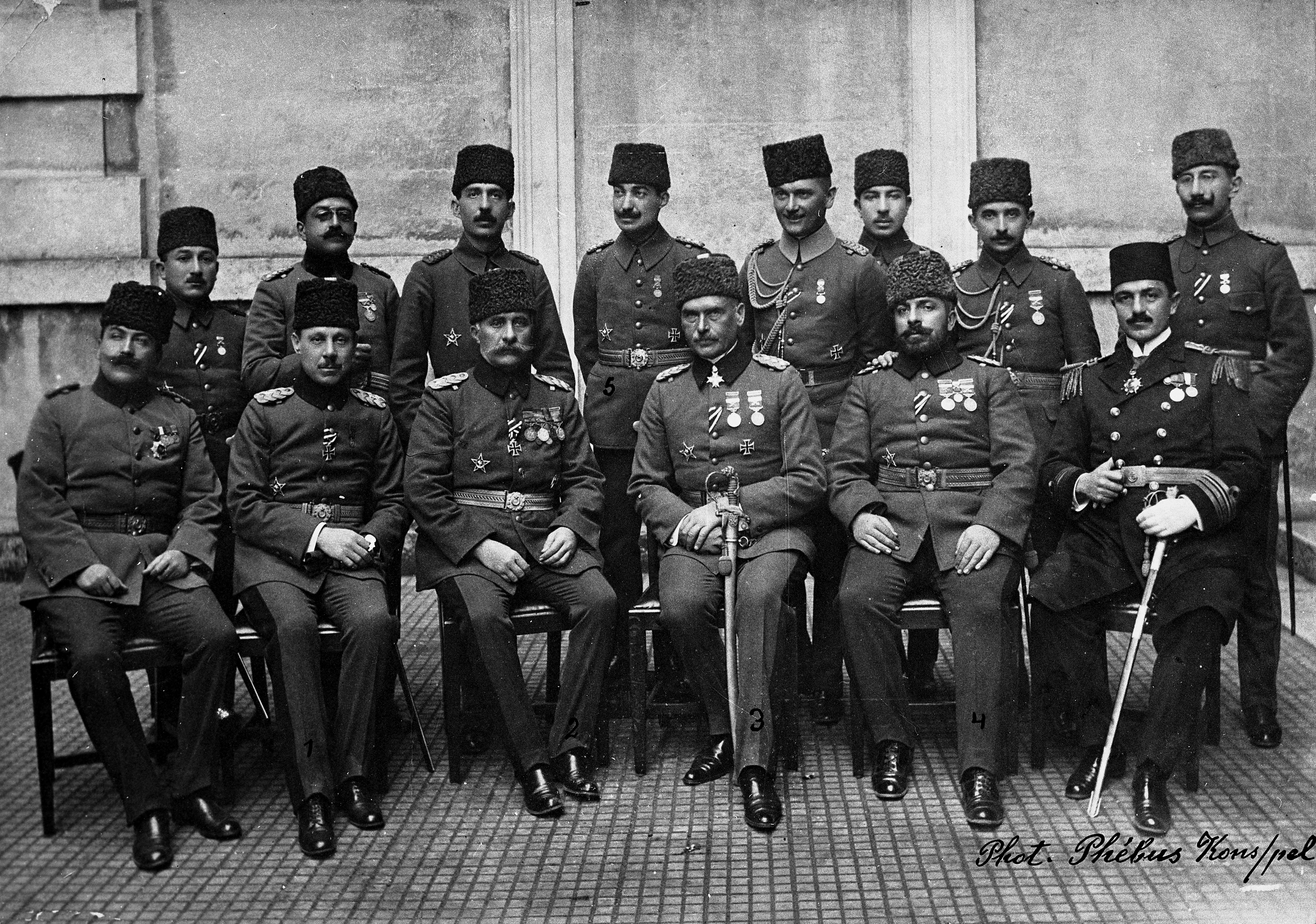 Liman von Sanders mit türkischen Offizieren Otto Liman von Sanders, General der Kavallerie, türkischer Marschall geb: 17.2.1855 in Stolp, gest: 22.8.1929 in München. U.B.z. Marschall Liman von Sanders mit türkischen Offizieren. 1. Suleinam Noumann-Pascha, Chef des Sanitätswesens. 2. Essad-Pascha. Kommandant der Nordgruppe. 3. Marschall Liman von Sanders. 4. Wehib-Pascha, Führer einer Armee, Kommandant der Südgruppe 5. Kiasim-Bei, türkischer Chef des Generalstabs einer Armee. [Gruppenbild Liman von Sanders mit türkischen Offizieren, u. a. Kiasim Bey] English Viewed People (first row, from right to left): Hüseyin Rauf Bey, chief of staff of the ottoman admirality Vehib Pasha, Commander of the south group (Gallipoli) Liman von Sanders, Otto: General, commander in chief of the ottoman army (GND 11878000X) Esat Pasha, Commander of the north group (Gallipoli) Süleyman Pasha, head of the medical service Cevat Pasha, military governor of İstanbul Deutsch Abgebildete Personen (erste Reiche, von Rechts nach Links): Hüseyin Rauf Bey, Stabschef des Marineministeriums Vehib Pascha, Kommandeur der Südgruppe Liman von Sanders, Otto: General, Oberbefehlshaber der Türkischen Armee, Deutschland (GND 11878000X) Esat Pascha, Kommandeur der Nordgruppe Süleyman Pascha, Chef des Sanitätswesens Cevat Pascha, Stadtkommandant İstanbuls Türkçe Resim´deki kişiler (ilk sıra, sağdan sola): Hüseyin Rauf Bey, Bahriye Nezareti Kurmay Başkanı Vehib Paşa, Güney Grubu Komutanı Otto Liman von Sanders: 5. Ordu Komutanı (GND 11878000X) Esat Paşa, Kuzey Grubu Komutanı Süleyman Paşa, Sıhhiye Dairesi Başkanı Cevat Paşa, Çanakkale Müstahkem Mevkii Komutanı Resim´deki kişiler (ikinci sıra, sağdan sola): İsmet Bey, 2. Ordu Kurmay Başkanı (sağdan ikinci) Üsteğmen Asım Bey, Yaver Süvari Binbaşı Perike, Liman von Sanders'in yaveri Kazım Bey, 5. Ordu Kurmay Başkanı Şükrü Bey, 1. Ordu Kurmay Başkanı Refik Bey, 2. Ordu Sıhhiye Başkanı